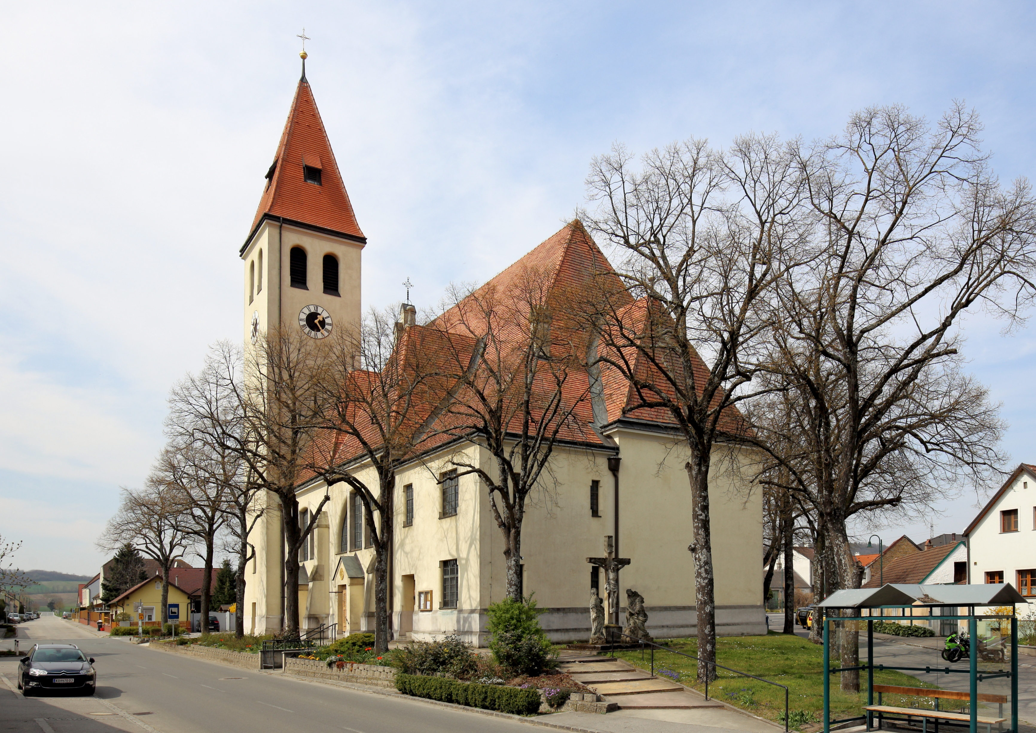 Ostsüdostansicht der katholischen Pfarrkirche Maria Geburt in der niederösterreichischen Marktgemeinde Enzersfeld im Weinviertel. Die Kirche wurde von 1908 bis 1909 im sezessionistischen, romantisierenden Stil errichtet.